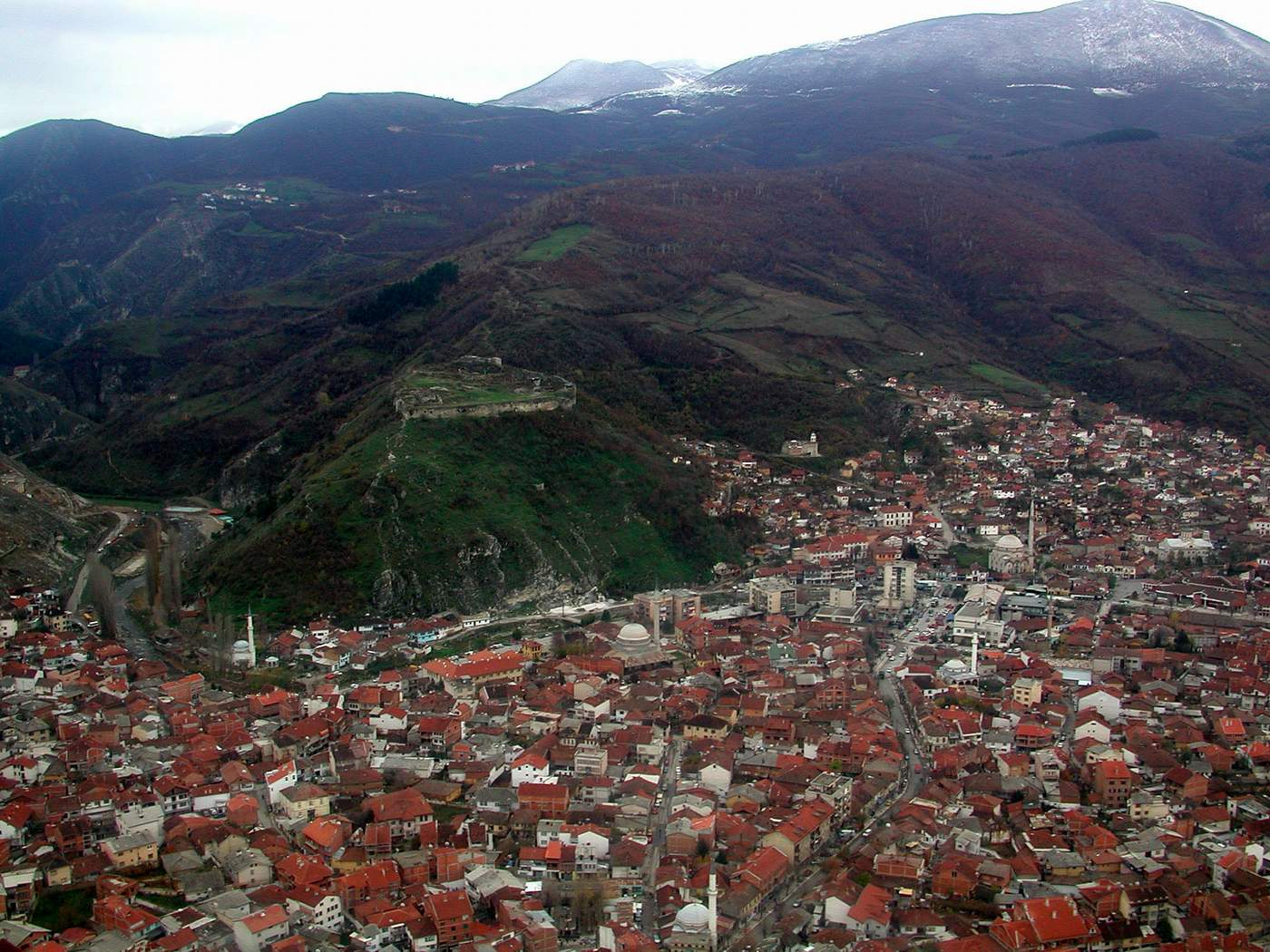 diğer_sürümler